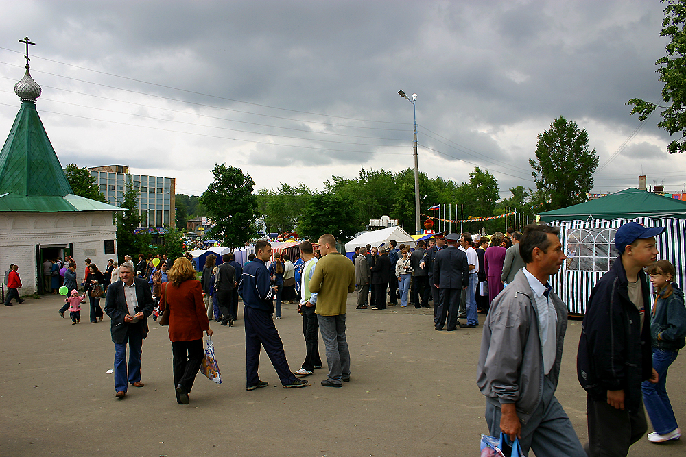 Kineshma, Tag der Stadt 2005